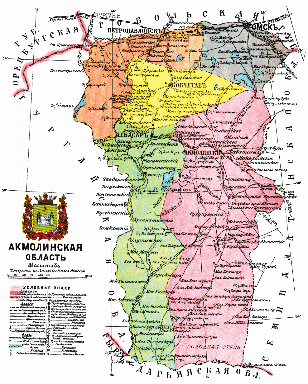 Карта Акмолинской области, 1913